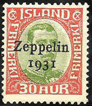 Авиапочтовая марка Исландии для дирижабля "Граф Цеппелин"